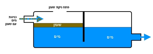 מפריד שומן לניקוי מים אפורים (מתוך אתר מים אפורים)